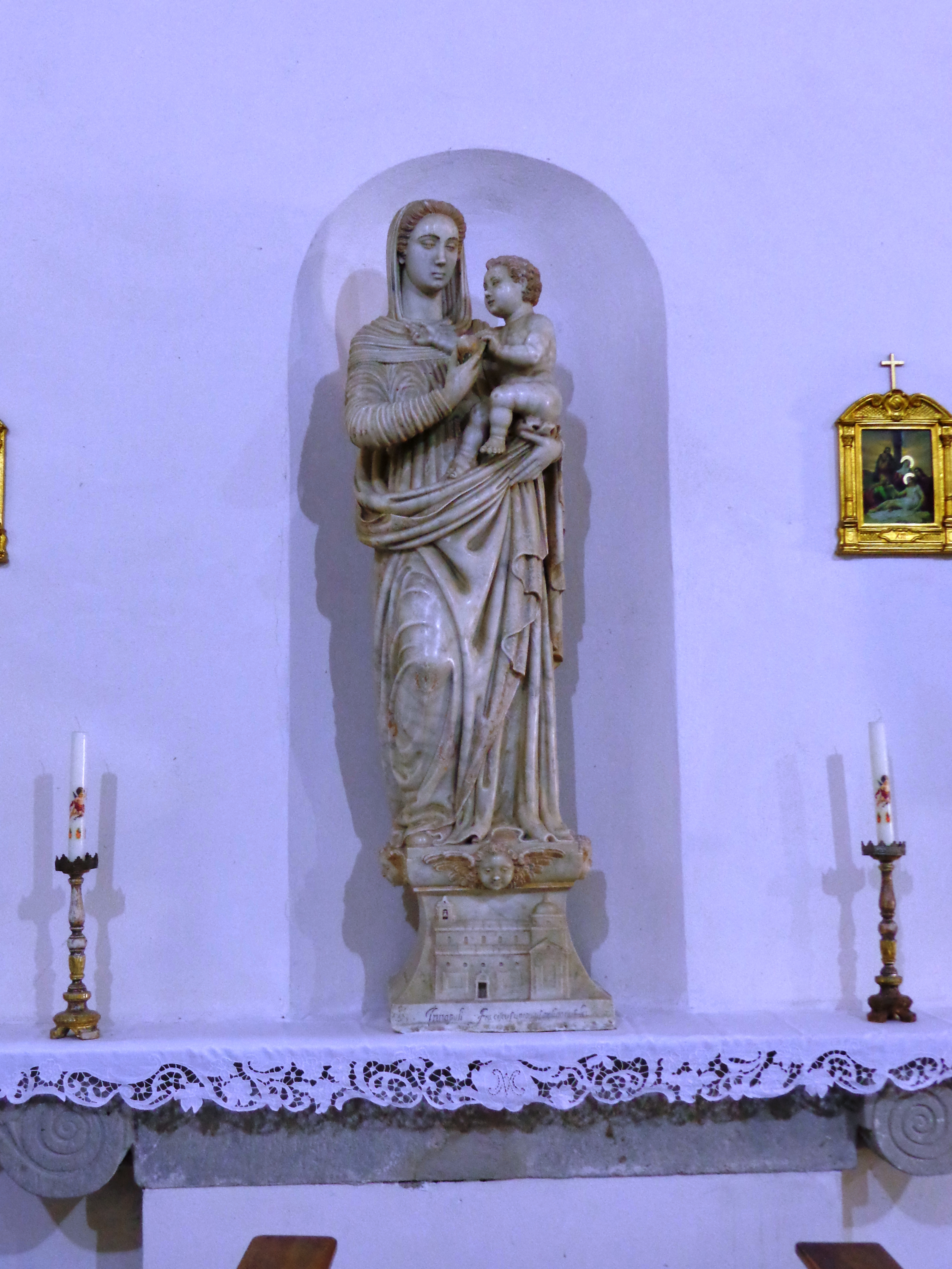 Castroreale_04_2014_10